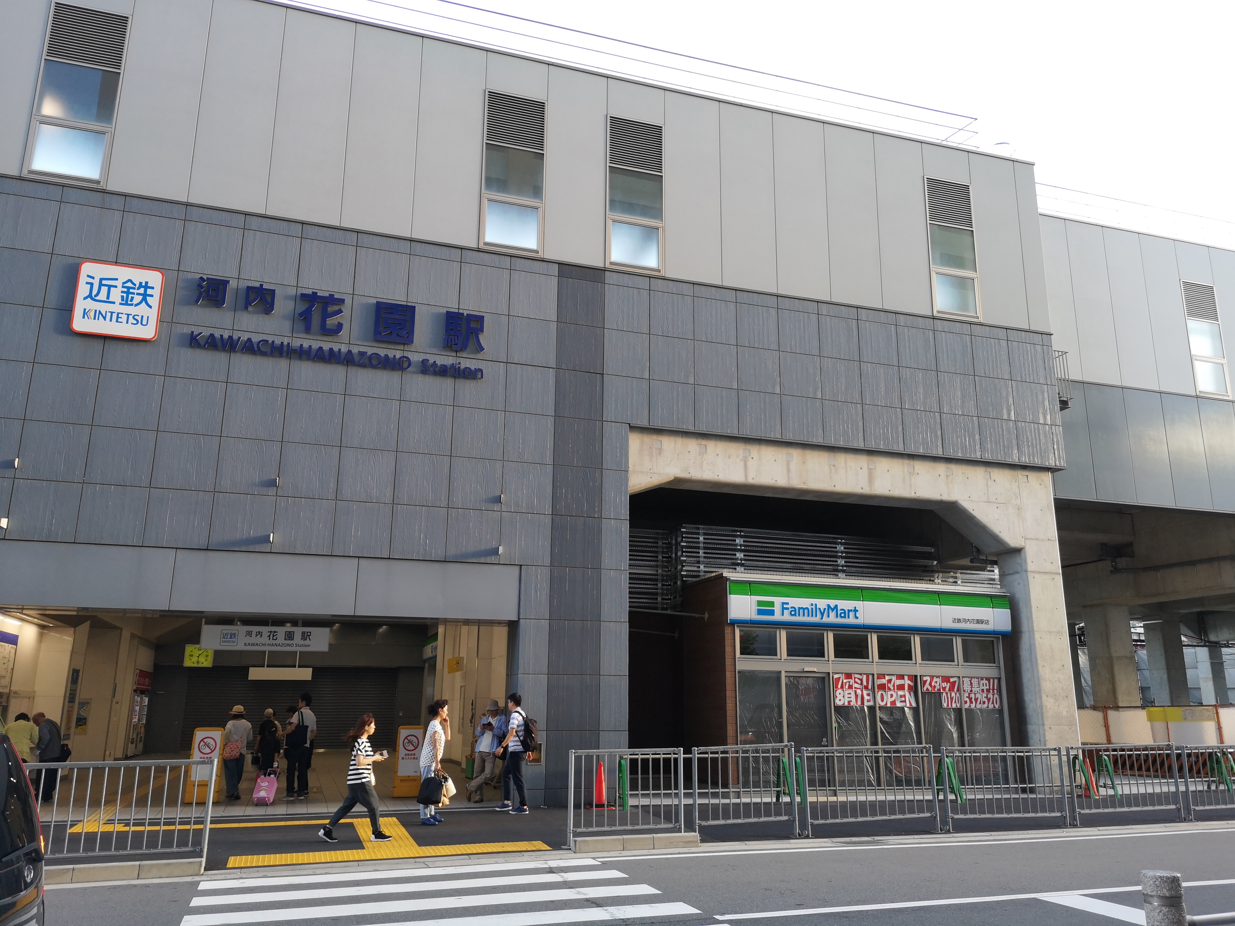 河内花園駅 2018年7月末撮影